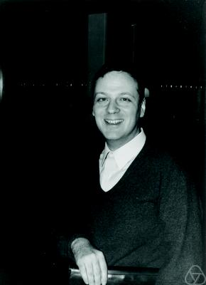 Foto di Paul-André Meyer